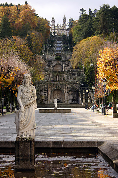 Lamego - Santuário de Nossa Senhora dos Remédios e Avenida Alfredo de Sousa